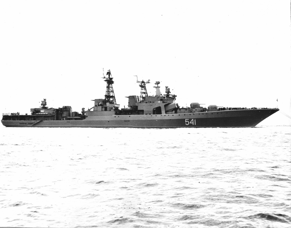 БПК "Адмирал Захаров" в 1990 году.